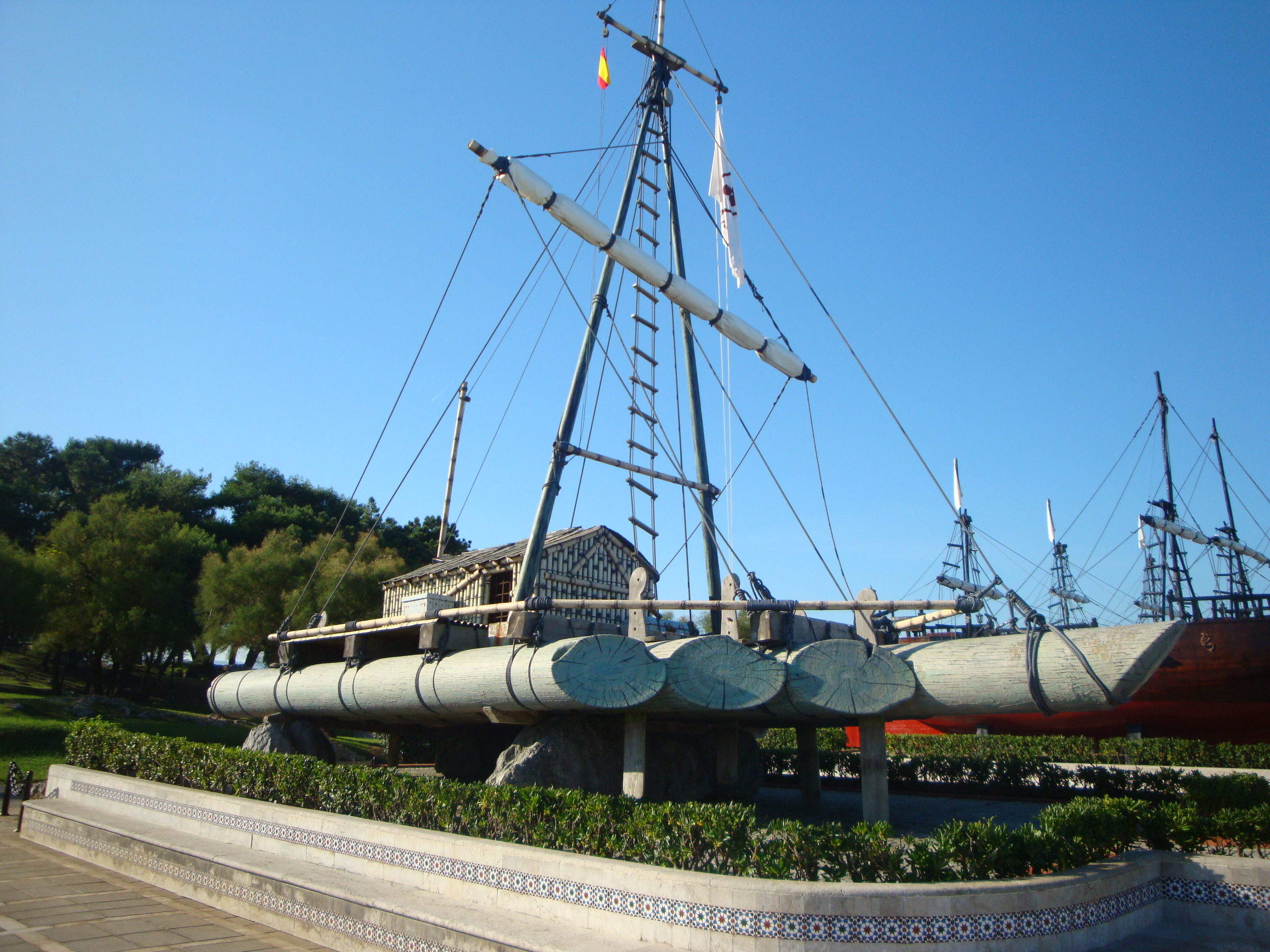 Bote velero en la península de La Magadalena (Santander) España